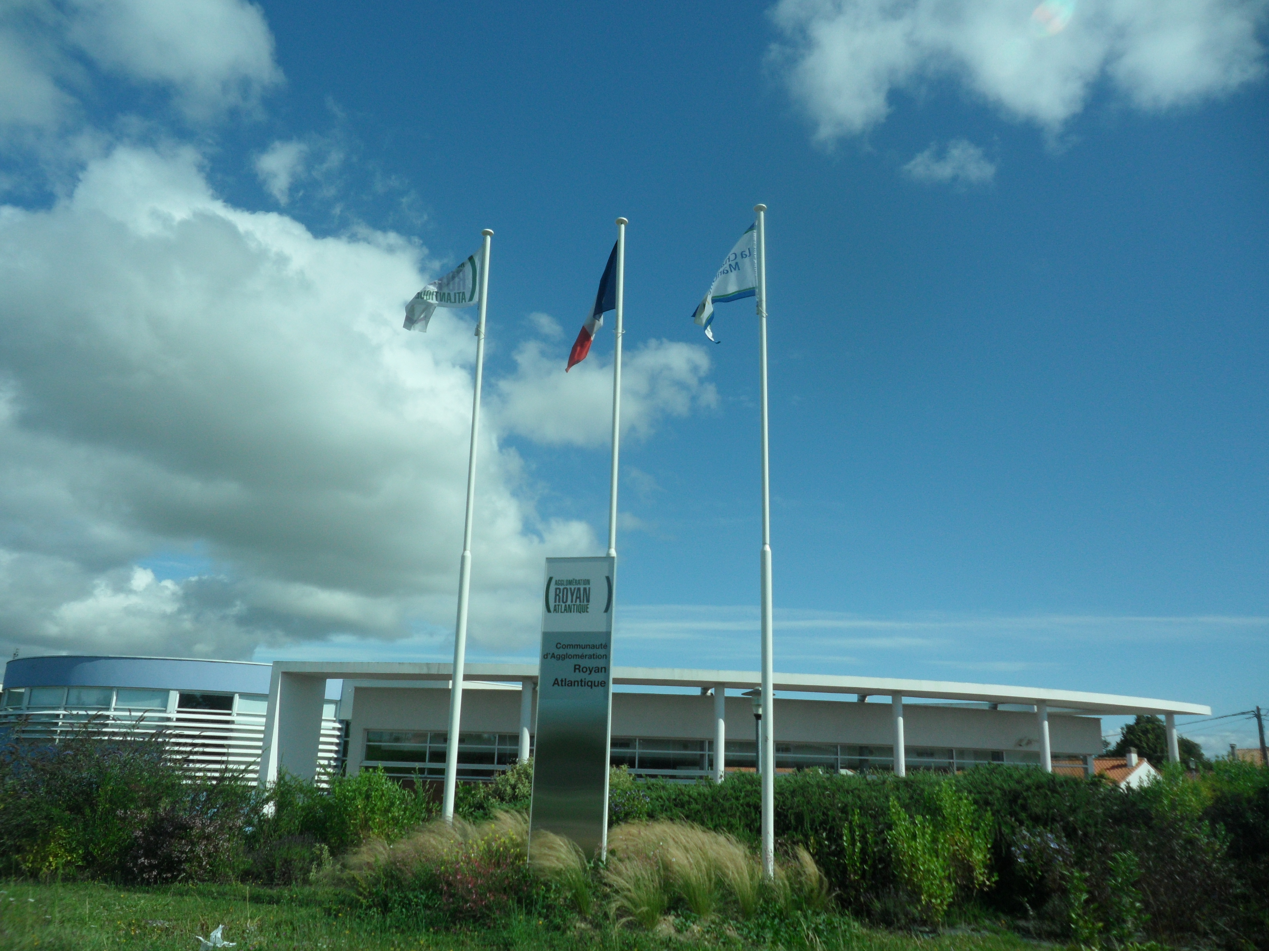 Bâtiment de la Communauté d'agglomération Royan Atlantique